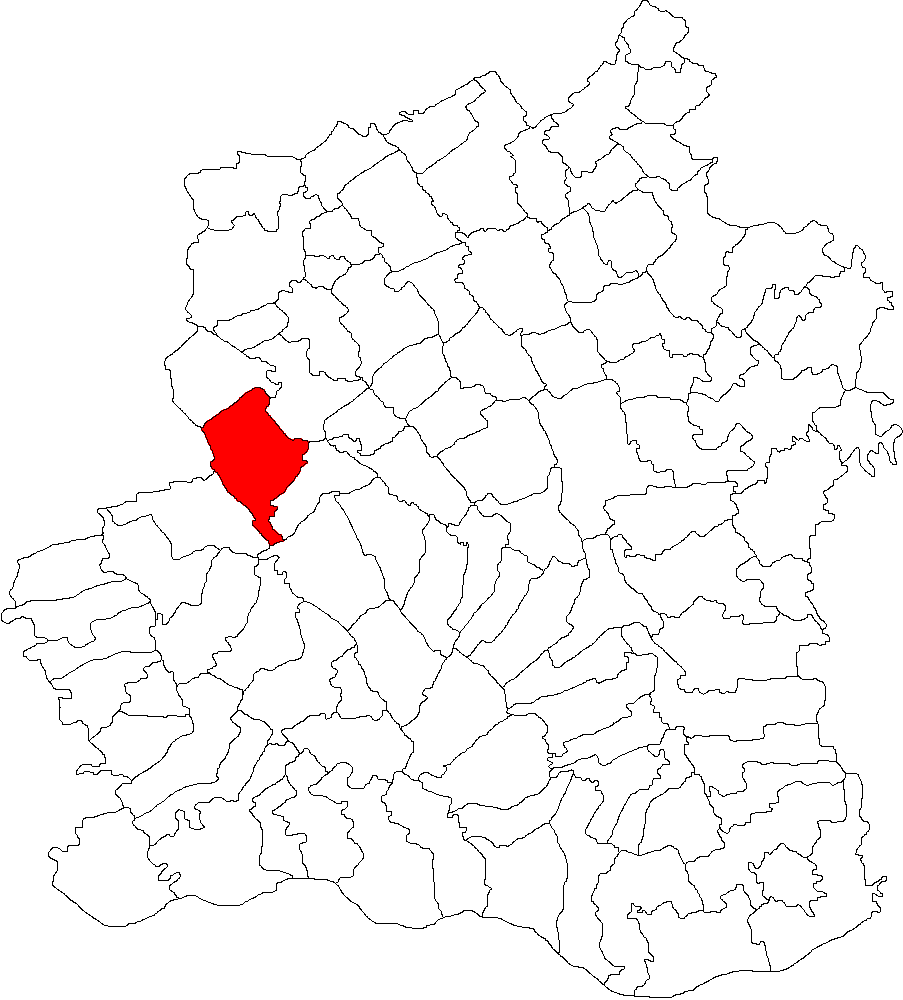 Categorie:Hărţi ale judeţului Teleorman